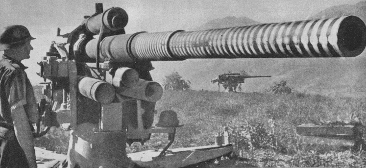 Batteria da 88 mm FlaK, i micidiali pezzi contraerei germanici usati con notevole successo anche per il tiro anticarro. Notare sul cannone in primo piano le strisce bianche, indicanti il numero degli aerei e carri nemici distrutti.